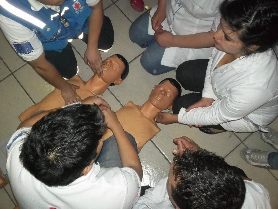 Voluntarios de la Cruz Roja Chilena enseñando maniobras de reanimación (RCP)